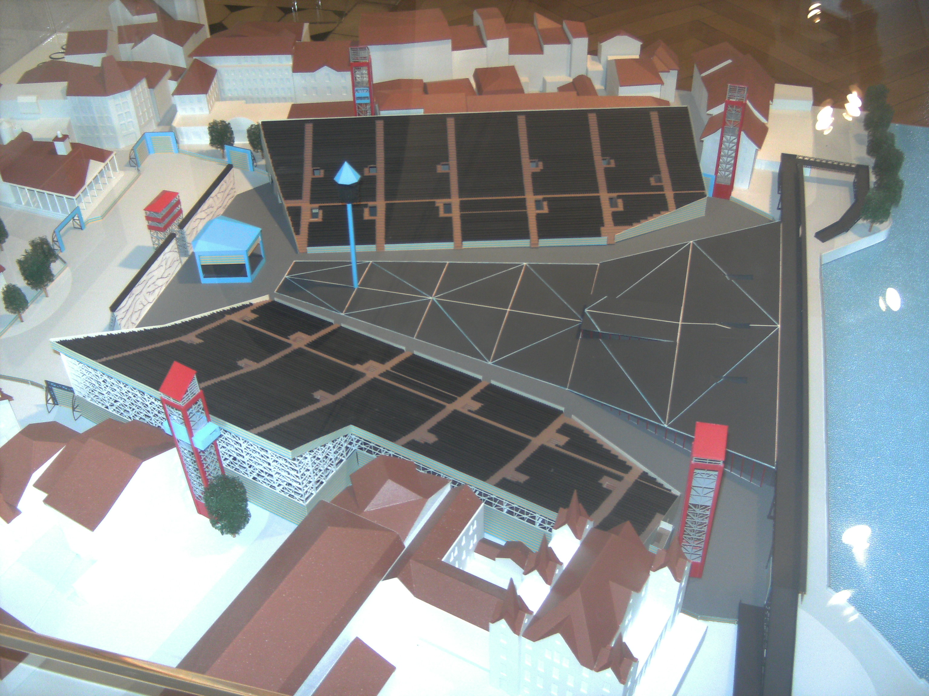 Vevey - fête des Vignerons - maquette de l'amphithéâtre de 1999 - exposée au musée historique de Vevey